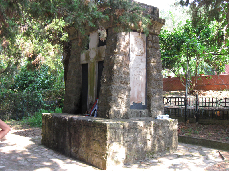 Споменик на гробљу српких јунака на острву Крф. Кости са гробља су накнадно премештене у маузолеј-костурницу на острву Видо.